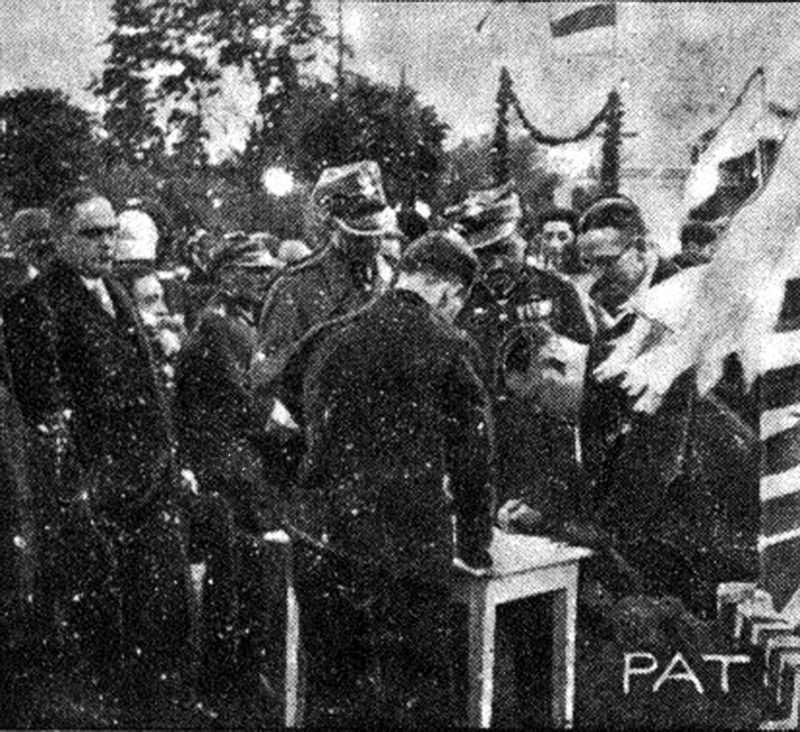 Białystok rok 1931. Wmurowanie kamienia węgielnego pod pomnik Ludwika Zamenhofa w Białymstoku, który miał być pobudowany na obecnym Placu katyńskim (projekt nie został zrealizowany).